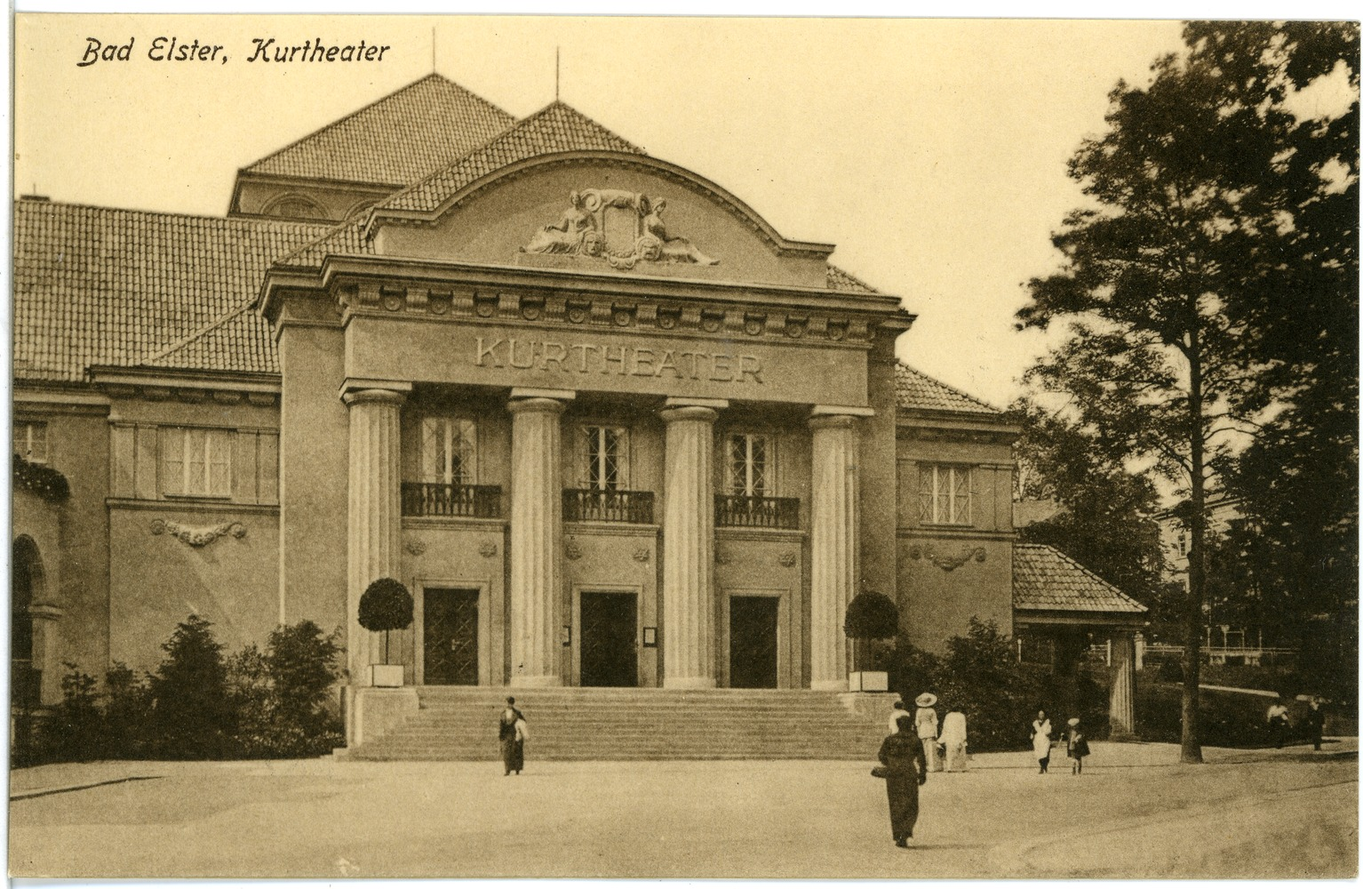 Bad Elster; Kurtheater This postcard is from publisher Brück & Sohn in Meißen ( This postcard has a unique number 18020 and is available in a higher resolution at the publisher. This images was uploaded in a cooperation project between Wikipedians and the publisher.